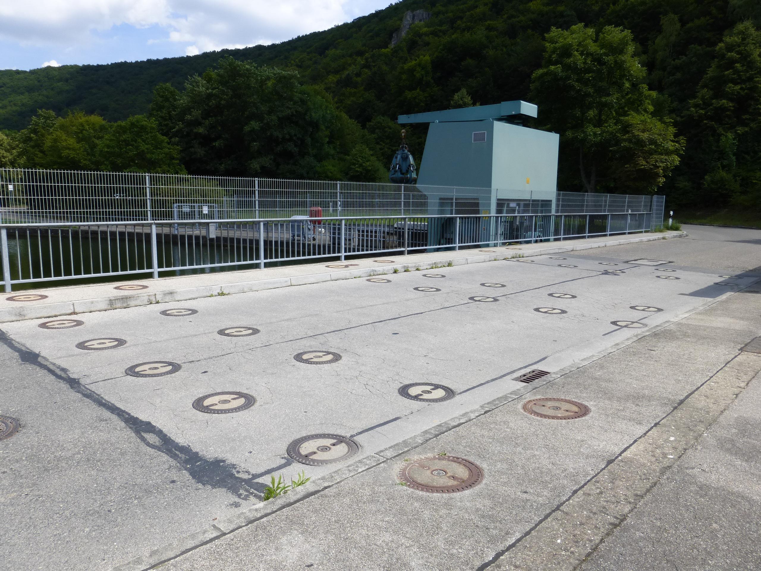 Stecksperren aus dem Kalten Krieg am östlichen Ende der Schleusenanlage Riedenburg-Haidhof (Lkr. Kelheim, Niederbayern) am Main-Donau-Kanal (Blick Richtung Osten)